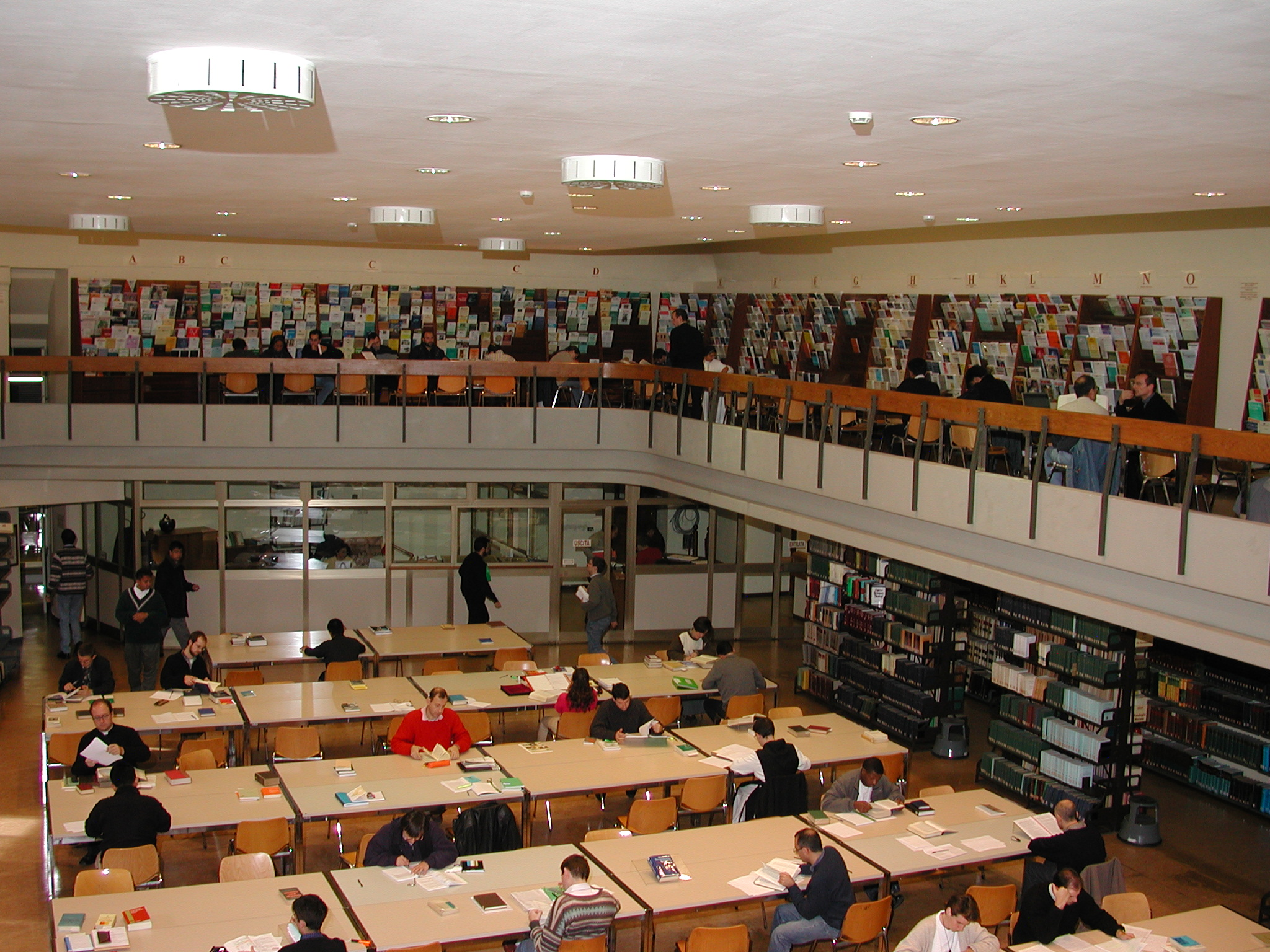 Pontificia Universita Gregoriana,Roma,Bibliotecha,sala,lettura,arch.Giulio Barluzzi,1930